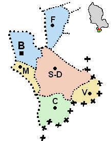 carte du canton de Beaucourt (Territoire de Belfort)